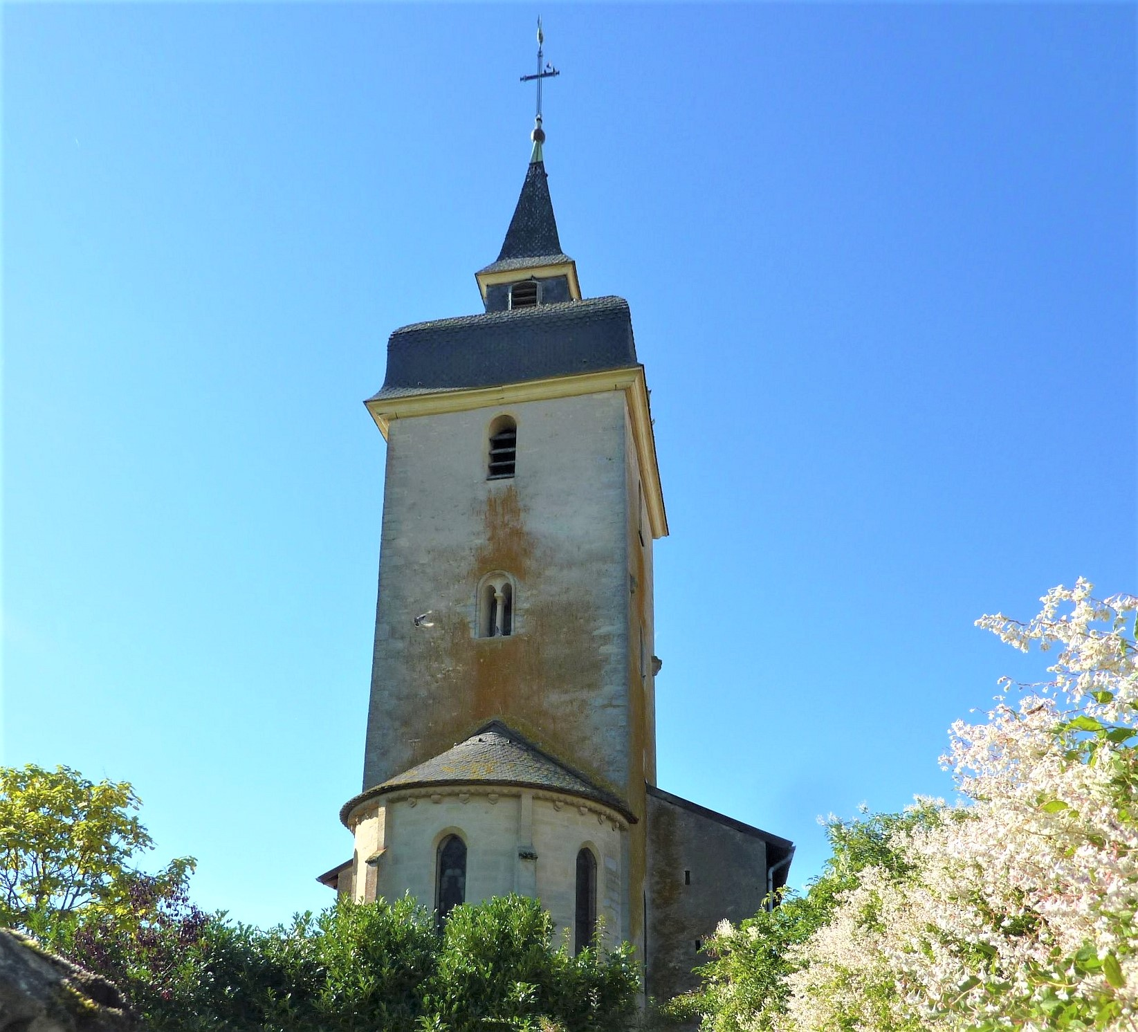 Église Saint-Clément (Vionville)